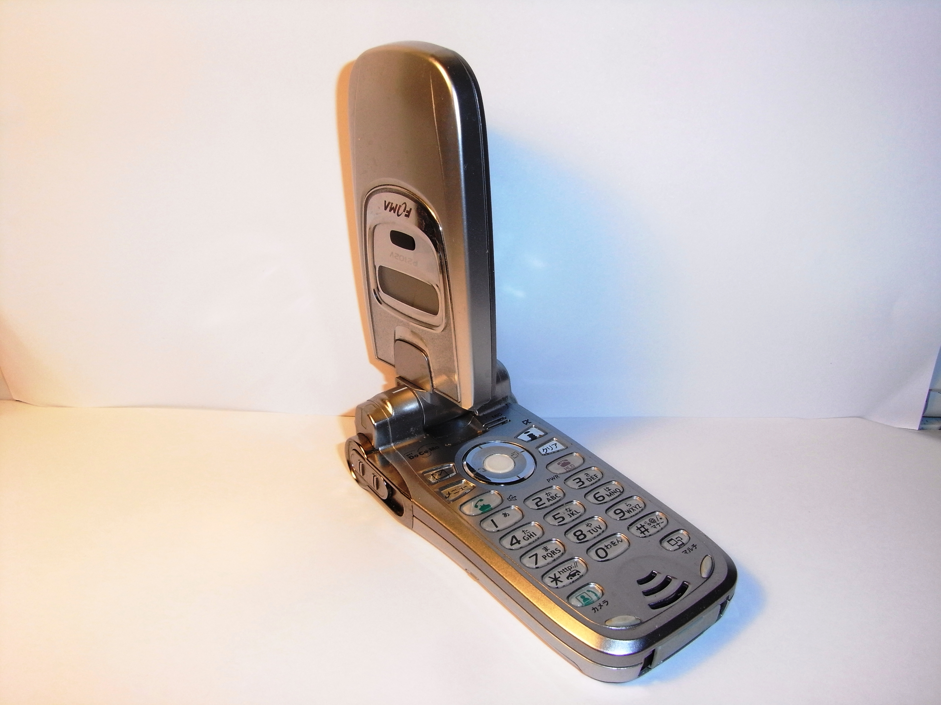 NTT docomo P2102V(P2102V